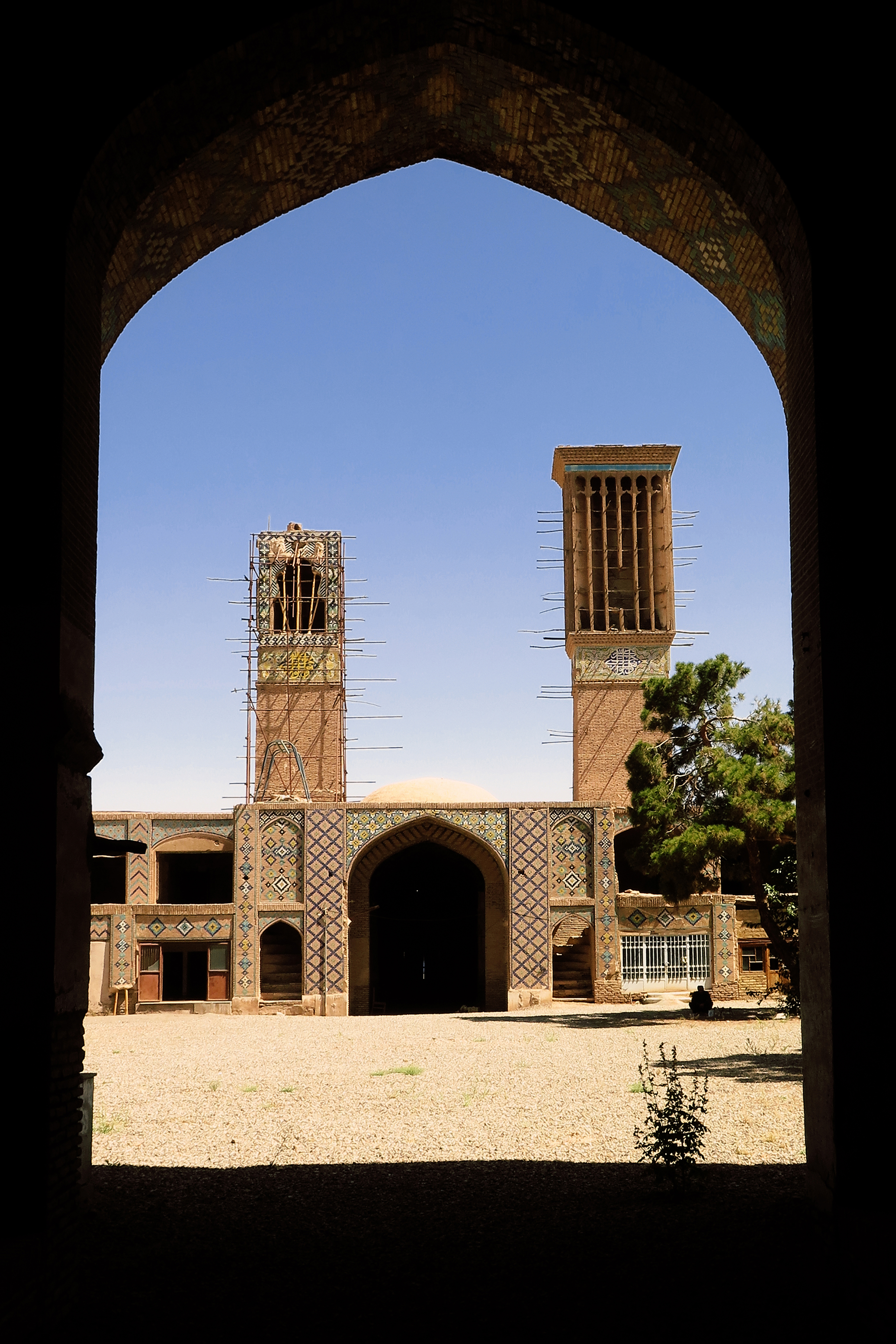 مجموعه وکیل